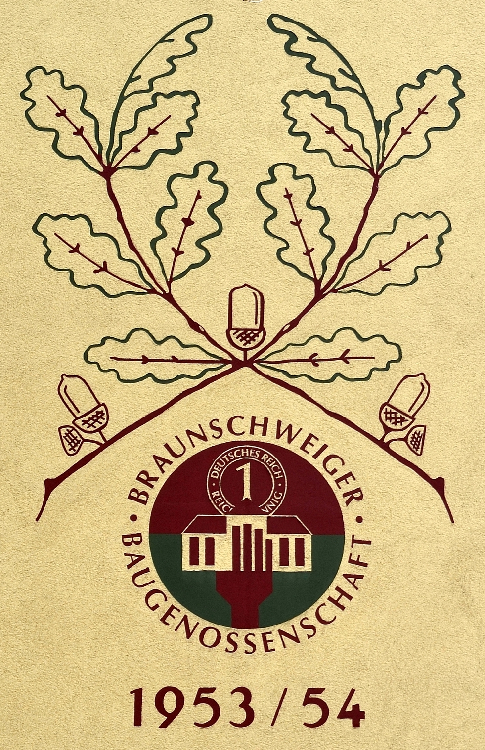 Braunschweig, Wollmarkt, Ecke Kaiserstraße: Hinweis auf den Wiederaufbau im Bereich Neustadt/Wollmarkt